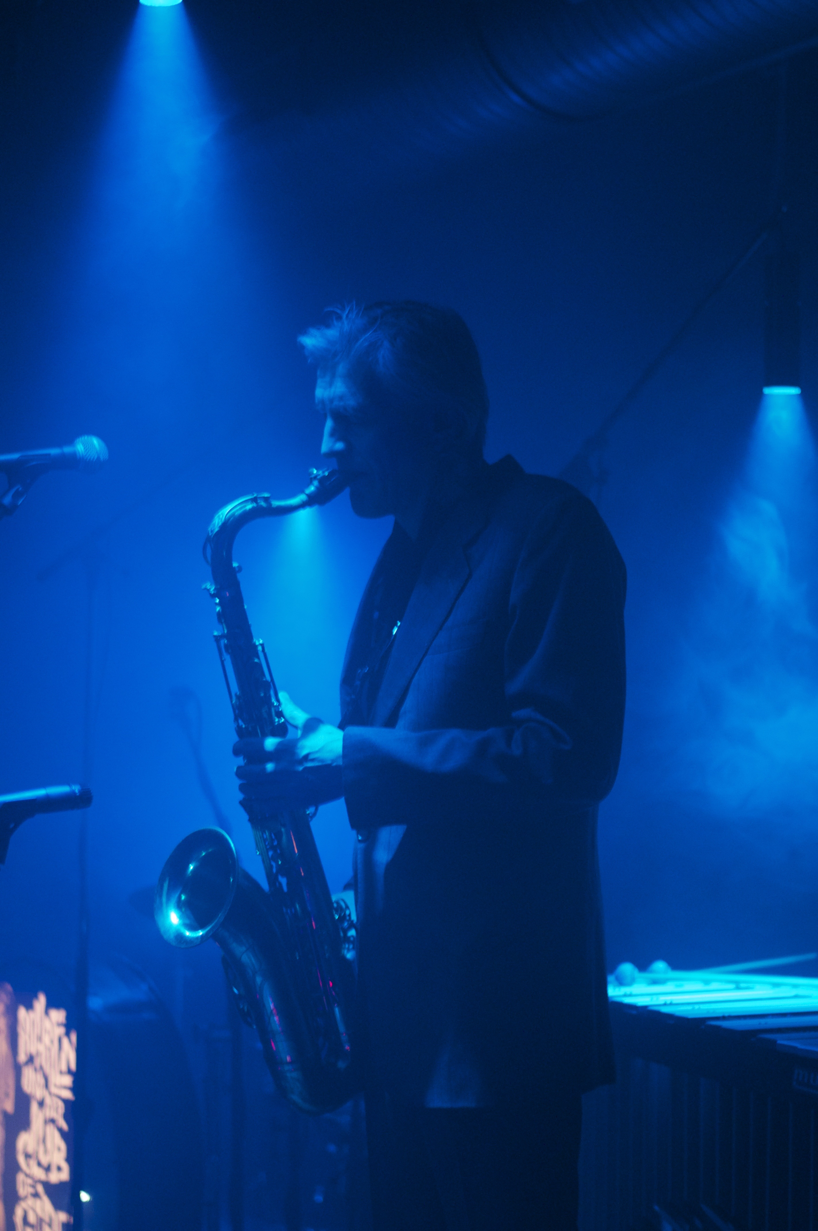 Bohren & der Club of Gore performing at Hamburg, Nochtspeicher, 28.02.2014